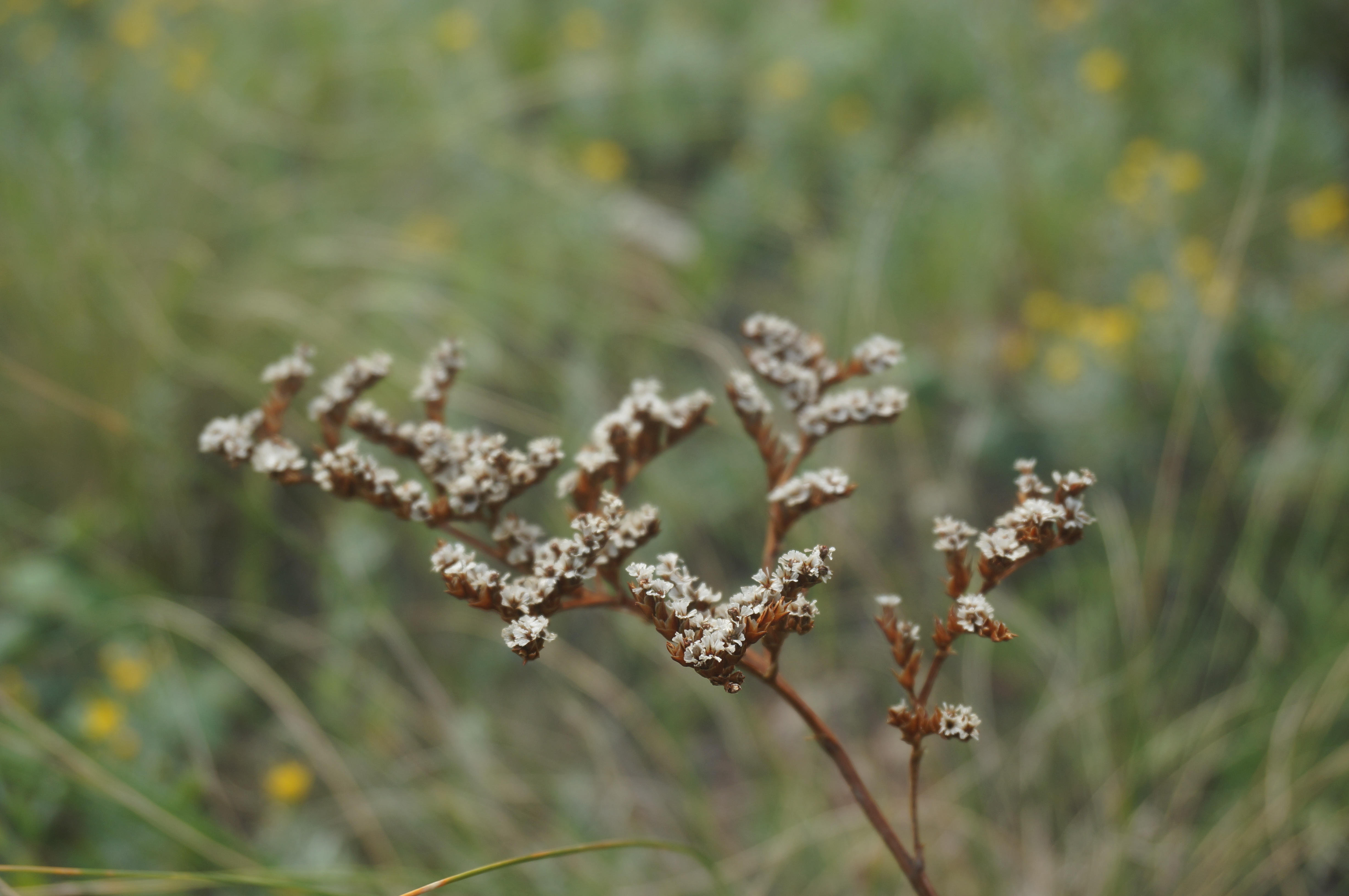 Гониолимон высокий (углостебельник высокий, Goniolimon elatum) в августе. Серноводный шихан,Самарская область, Россия